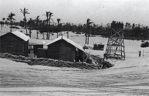 אפק - המגדל והצריפים